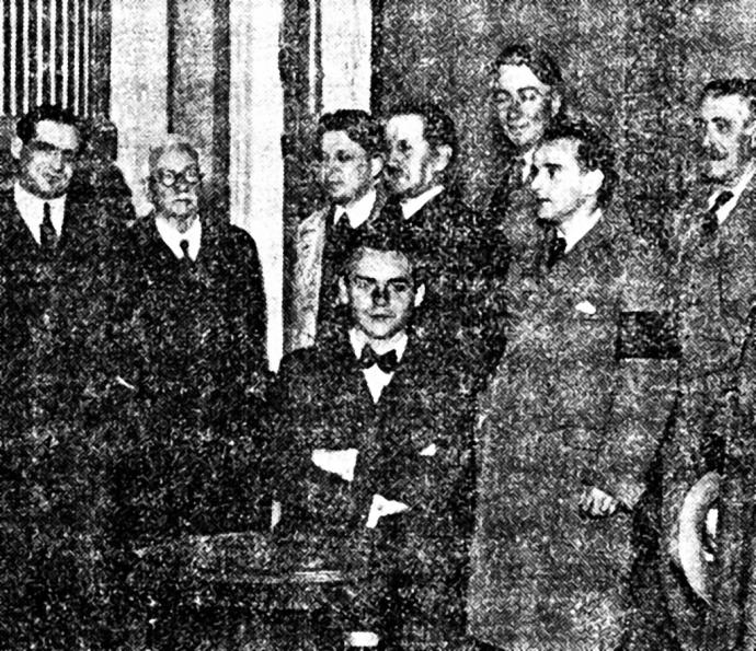 En Vigo en mayo de 1932, tras pronunciar una conferencia, Federico García Lorca con, entre otros, Roberto González Pastoriza, Manuel Gómez Román (el más alto), Eugenio Arbones Castellanzuelo, Eugenio Fadrique González y Jerónimo Toledano Cañamaque.[1]